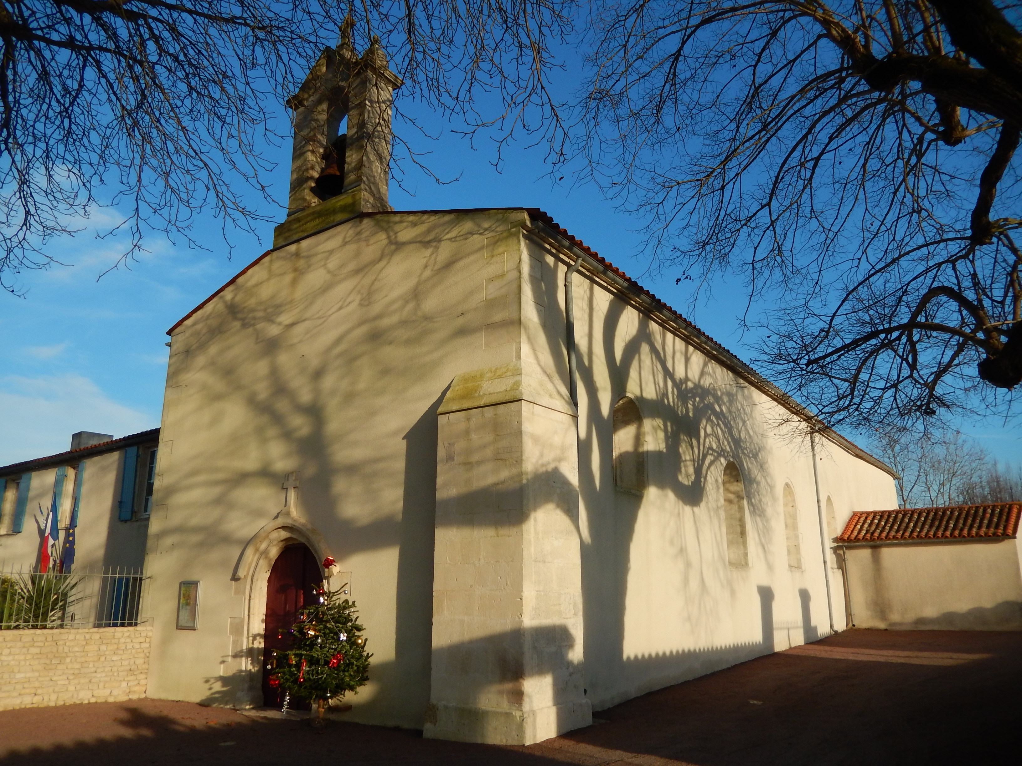 L'église de Longèves (Charente-Maritime, France).